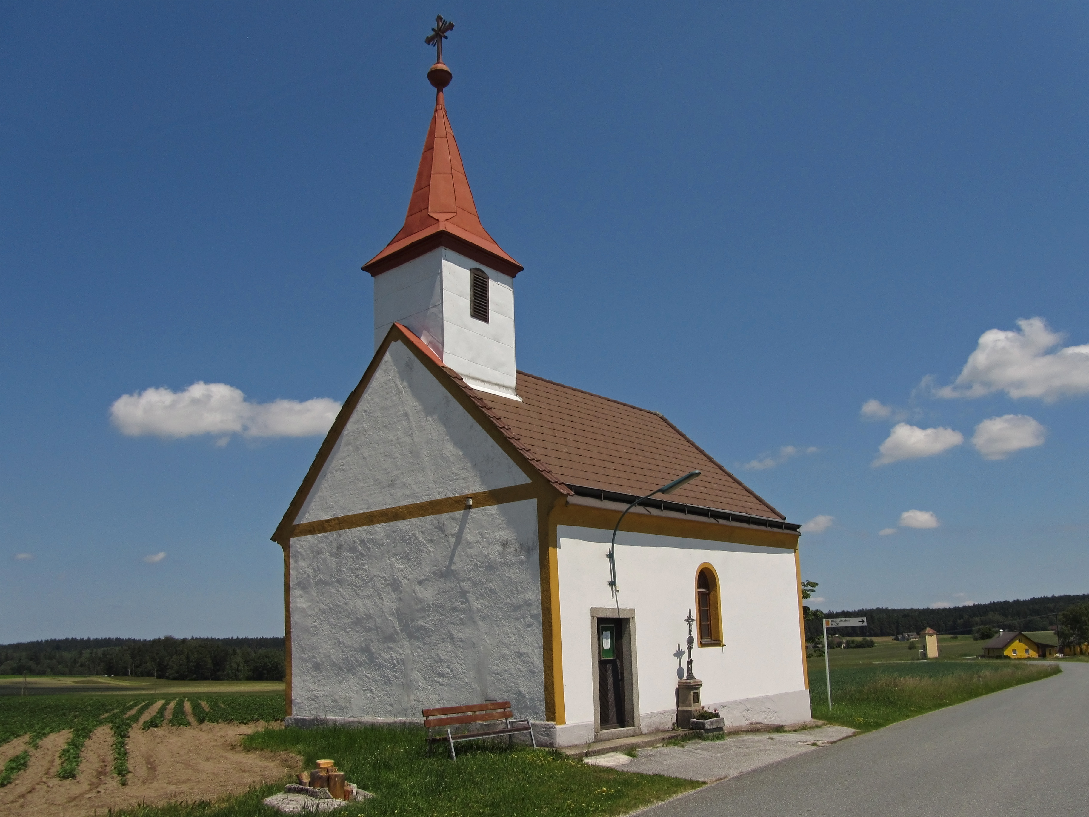 Ortskapelle Reinberg-Litschau